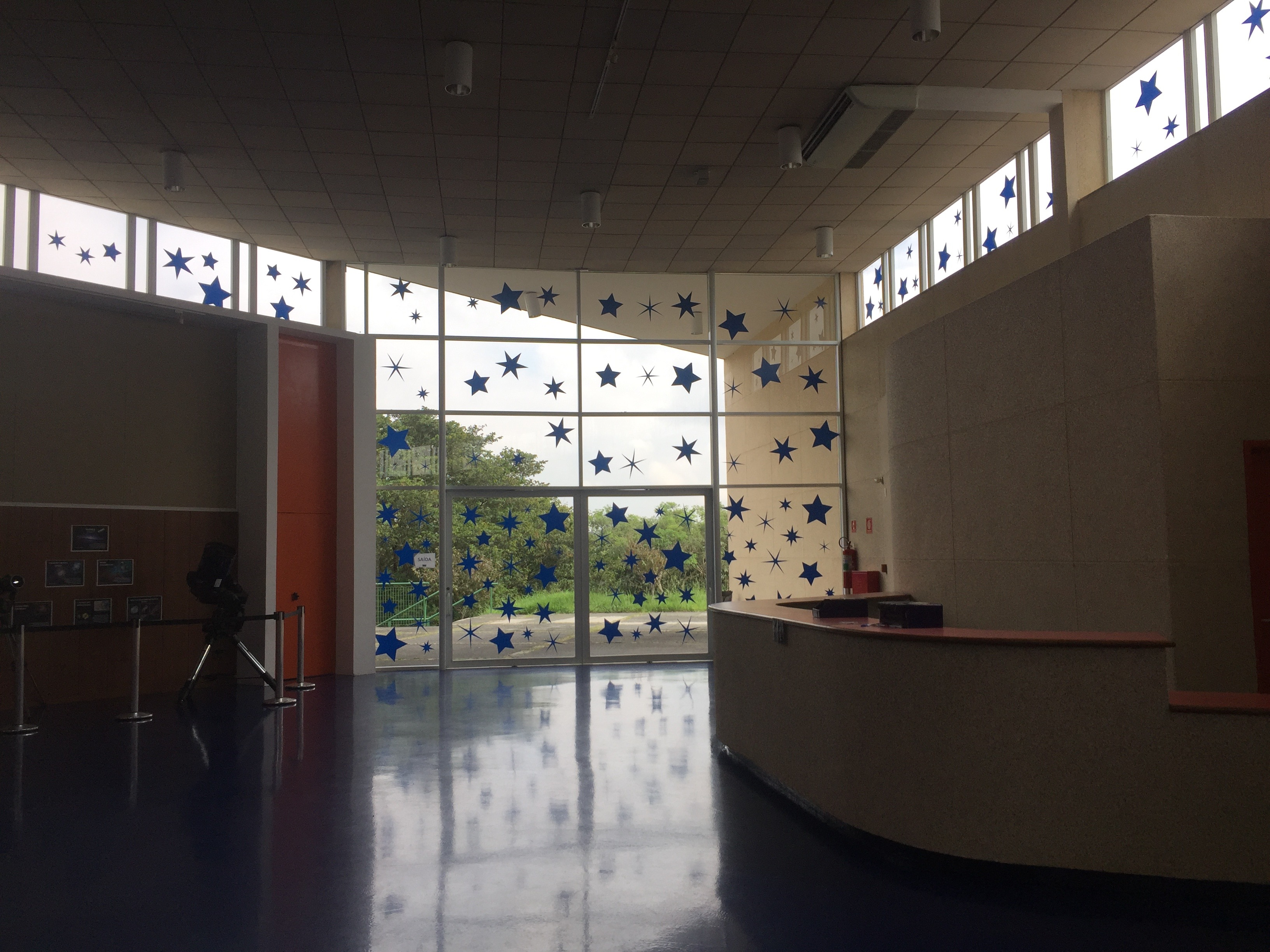 Vista parcial do interior do Planetário do Carmo.